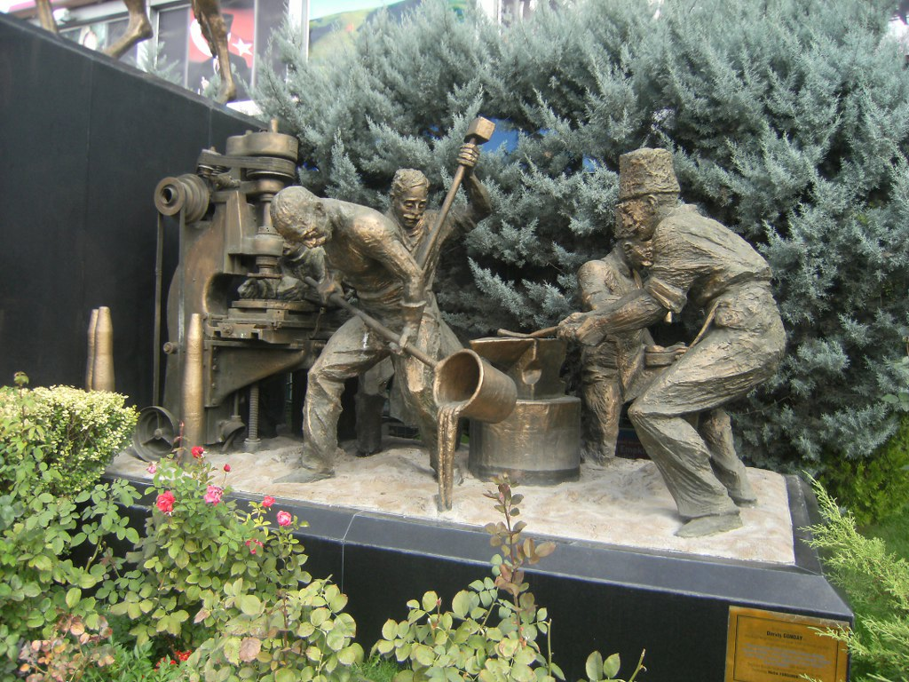 Metin Yurdanur tarafından yapılan TESK anıtı